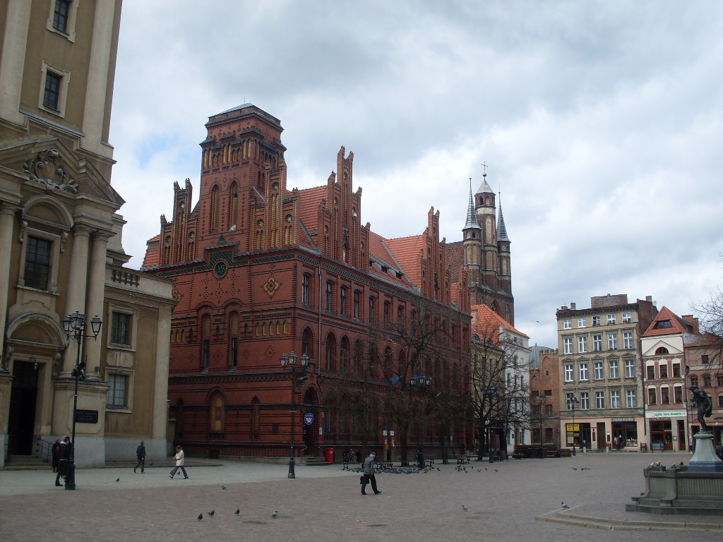 Das Postamt aus der Kaiserzeit in Thorn